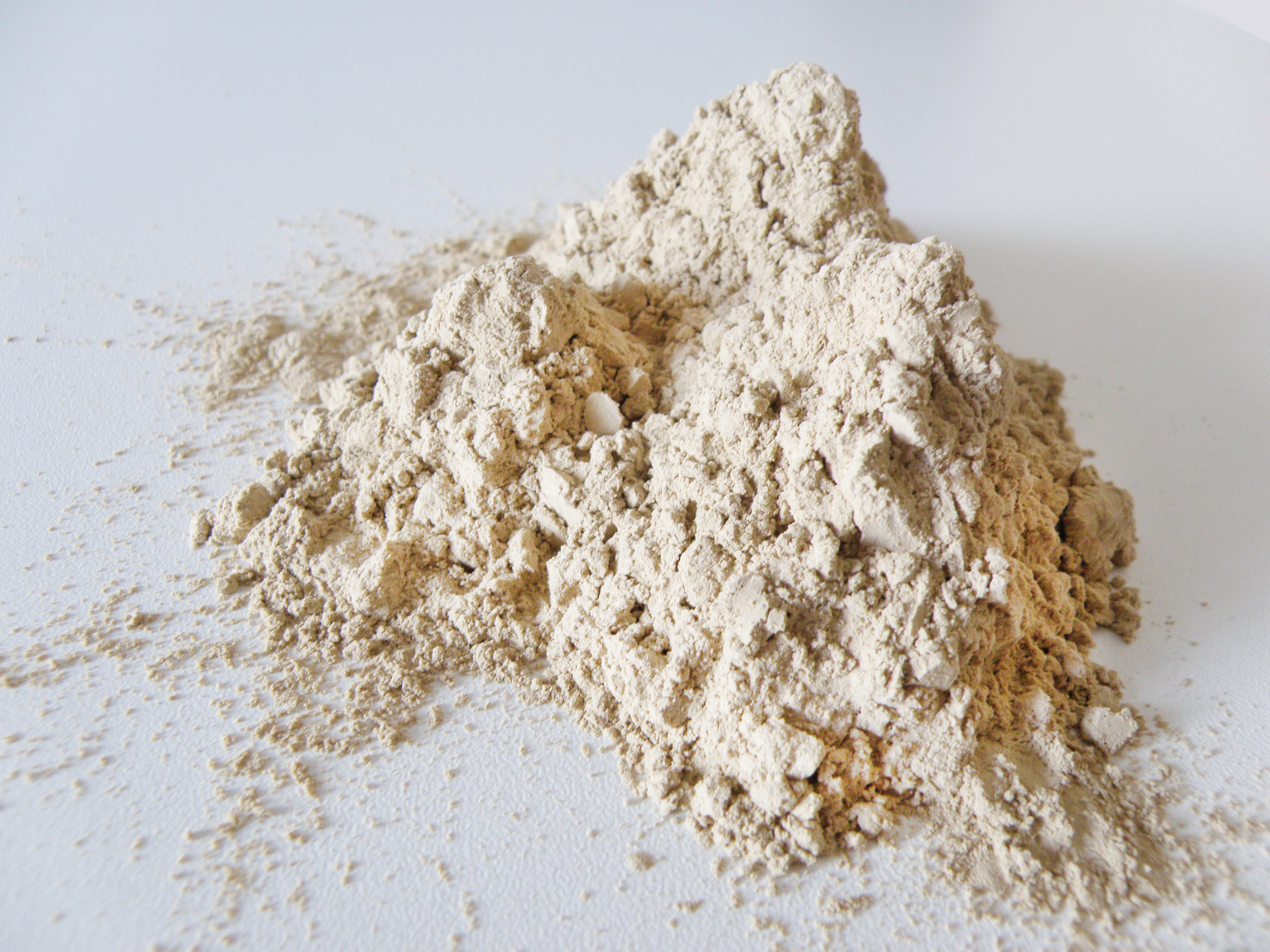 Минерал